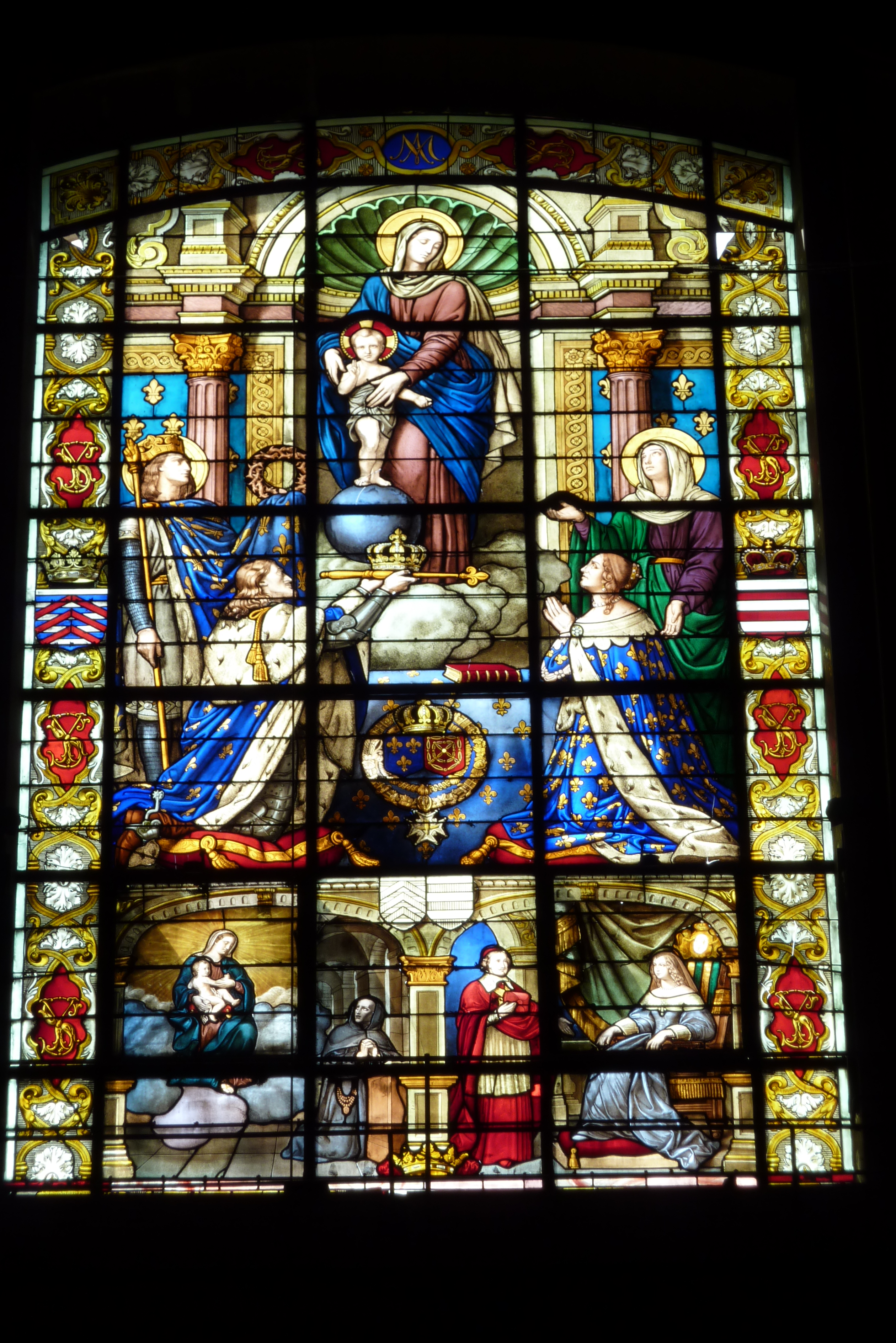 Bleiglasfenster in der Kirche Notre-Dame-des-Victoires in Paris, Darstellung: Maria und Kind (Mitte oben), links der französische König Ludwig IX. (der Heilige), der die Dornenkrone Christi in der Hand hält, in der Mitte der frz. König Ludwig XIII. (links) und seine Gemahlin Anna von Österreich (rechts), unten in der Mitte Frère Fiacre und seine Erscheinung: Maria mit dem zukünftigen Ludwig XIV. (links)